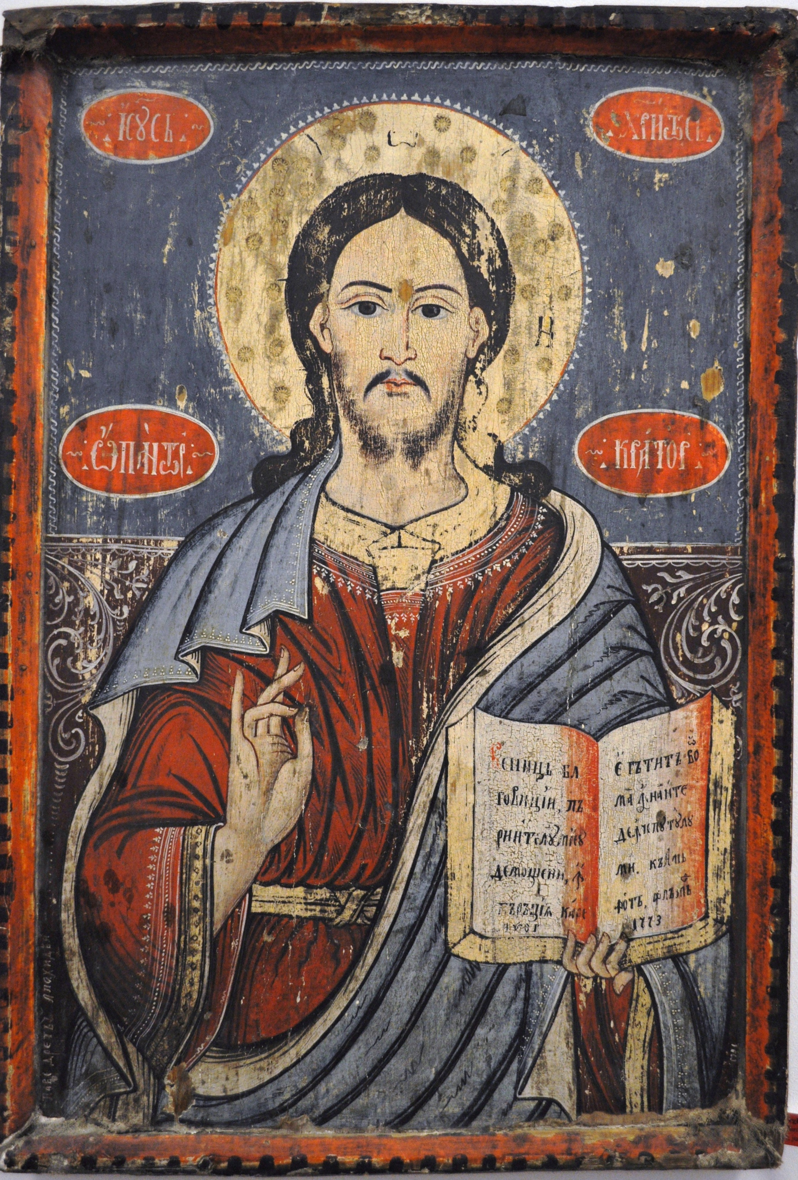 Icoană împărătească a bisericii de lemn din Petea, județul Mureș